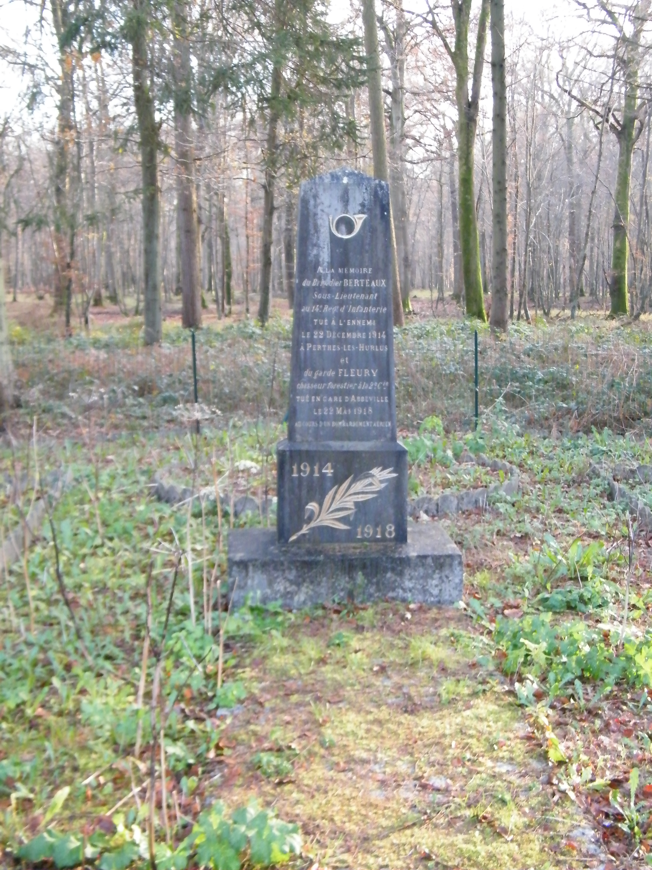 Monument à la mémoire de deux agents morts pour la France, 1914-1918, Hutte des vieux chênes.